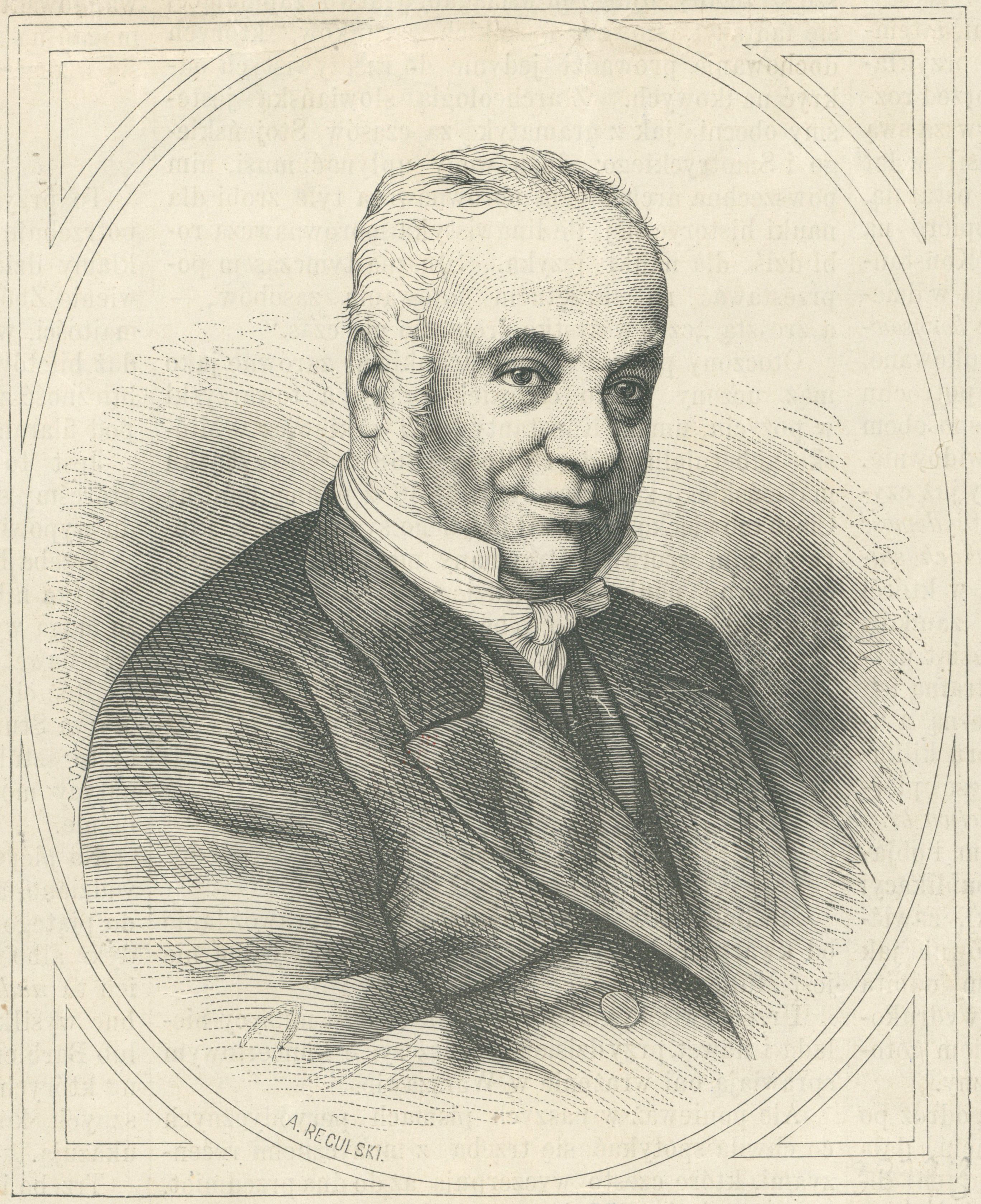 Беларуская (тарашкевіца): Партрэт Канстантына Тышкевіча (Kanstantyn Tyškievič)